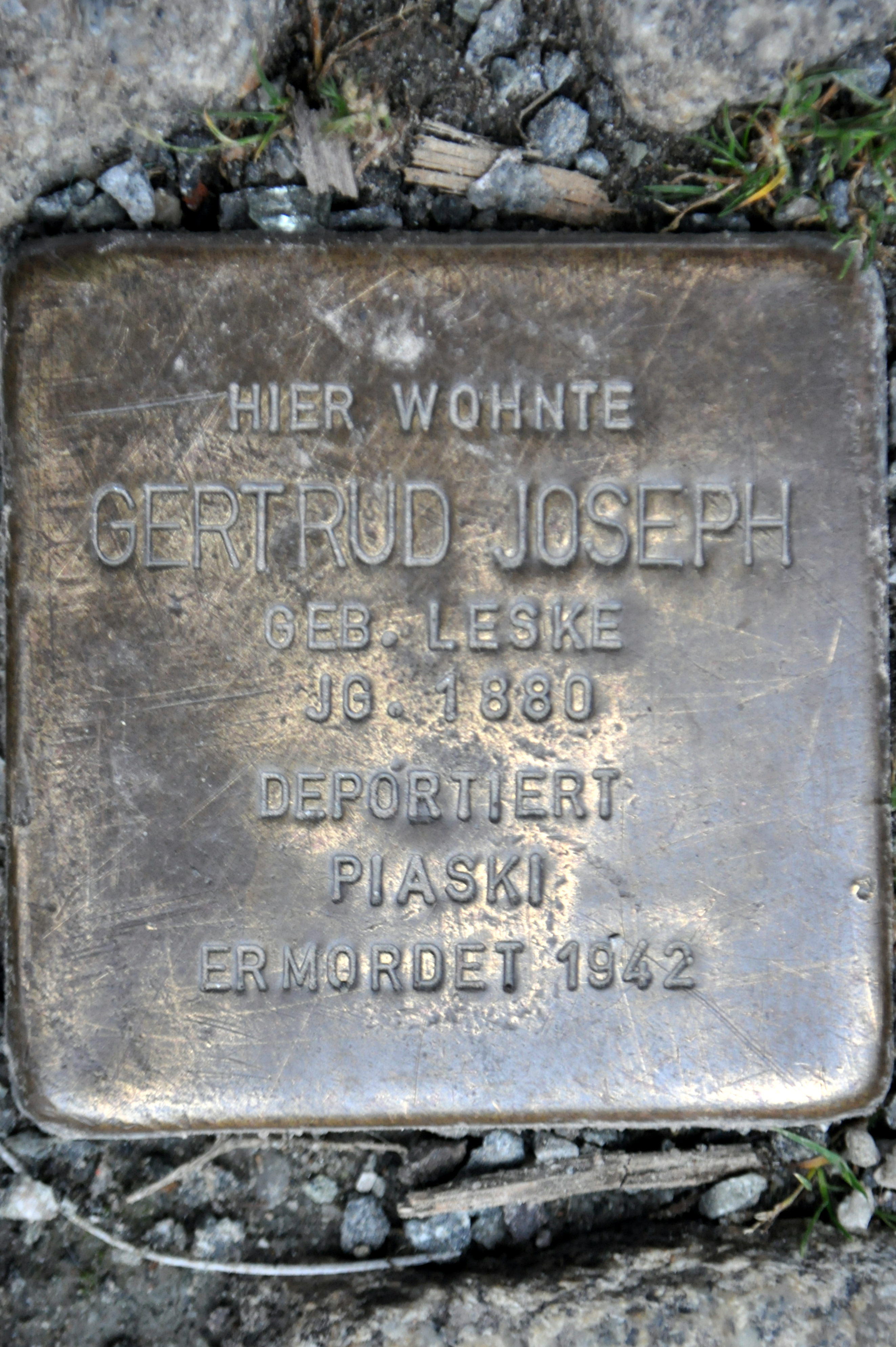 Stralsund, Külpstraße 15, Stolperstein Gertrud Joseph geb. Leske